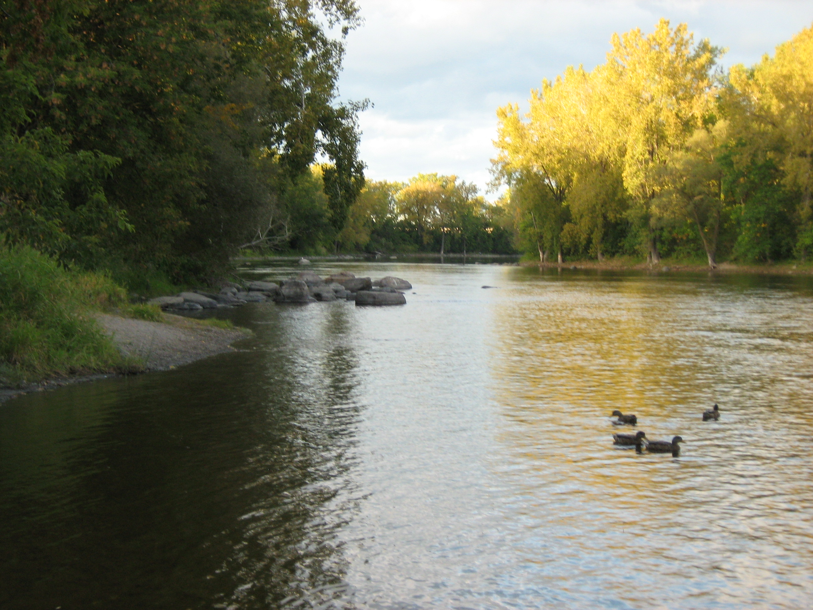 Canards au soleil couchant au parc-nature de l'Île-de-la-Visitation à Montréal en septembre 2009.